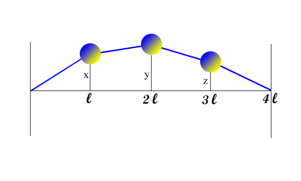 Illustration d'un pendule particulier à trois boules imaginé par D'Alembert pour modéliser une corde vibrante